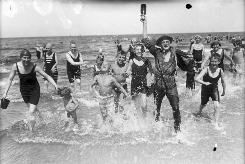 Höchste Eleganz am Badestrand! Eine moderne Badenymphe mit Monokel und Spazierstock im Photographierpose. Der Freund der Kinder, Onkel Pelle, im fröhlichen Wettlauf mit der Jugend am Badestrande!